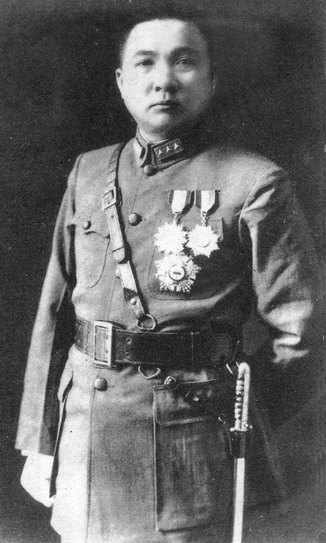 罗卓英